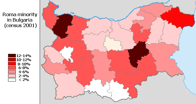 Roma minority in Bulgaria